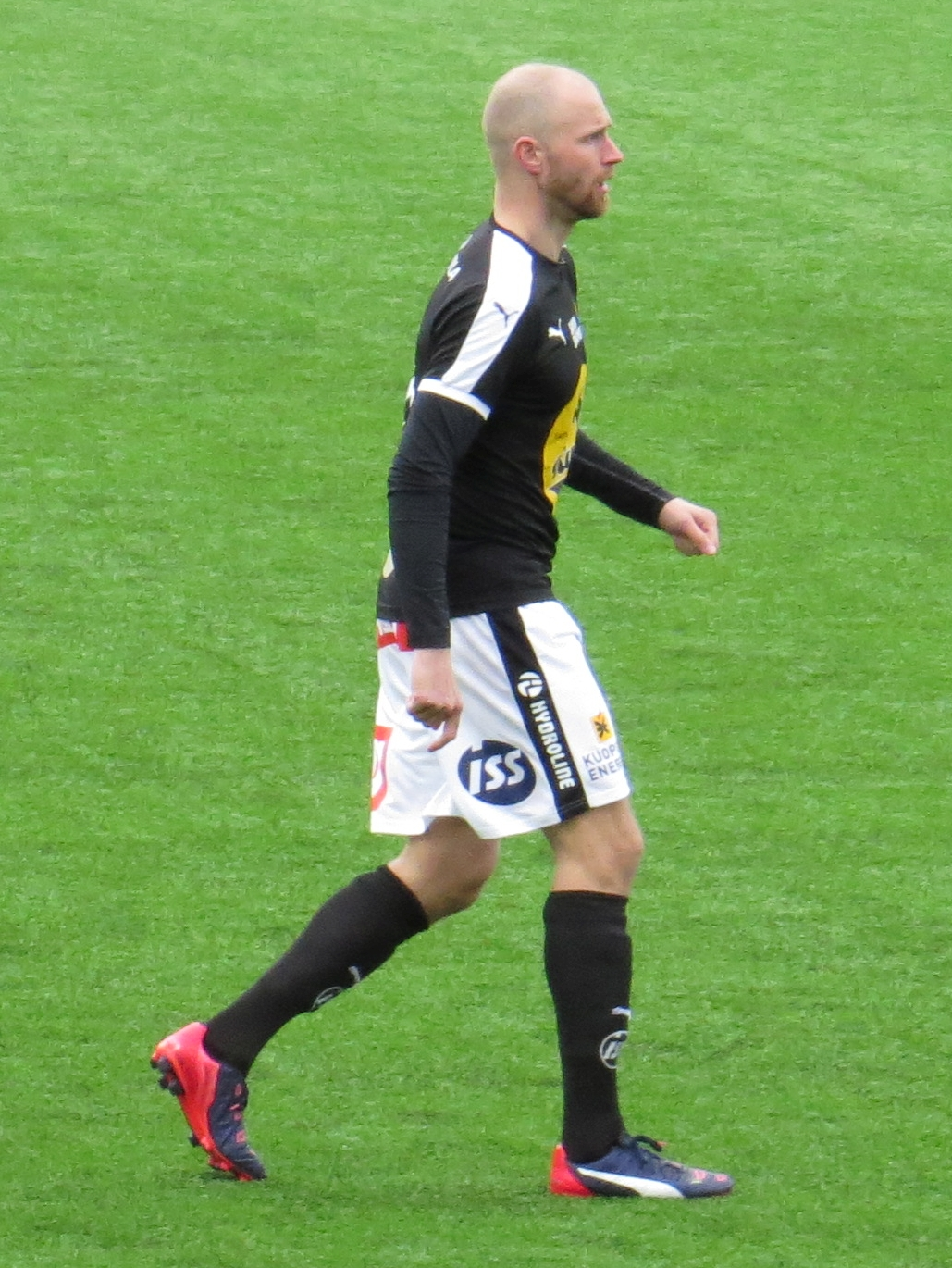 Miikka Ilo, suomalainen jalkapalloilija Kuopion Palloseuran joukkueessa kaudella 2015.